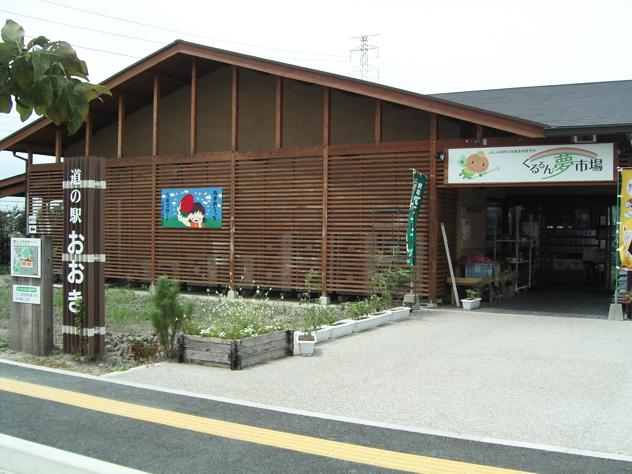 道の駅おおき「くるるん夢市場」